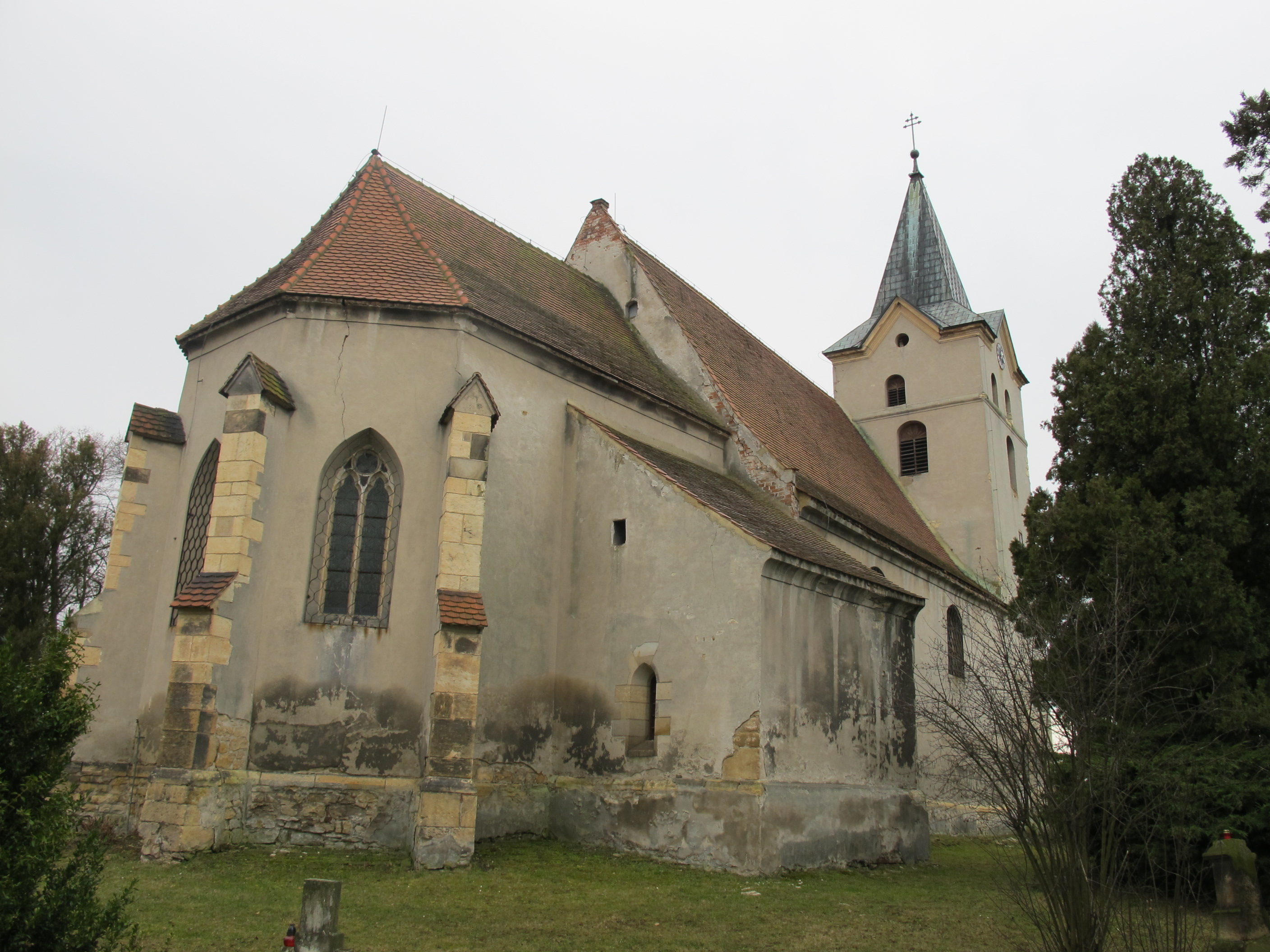 Kostel sv. Vavřince v Havrani (okres Most) - kněžiště od severovýchodu